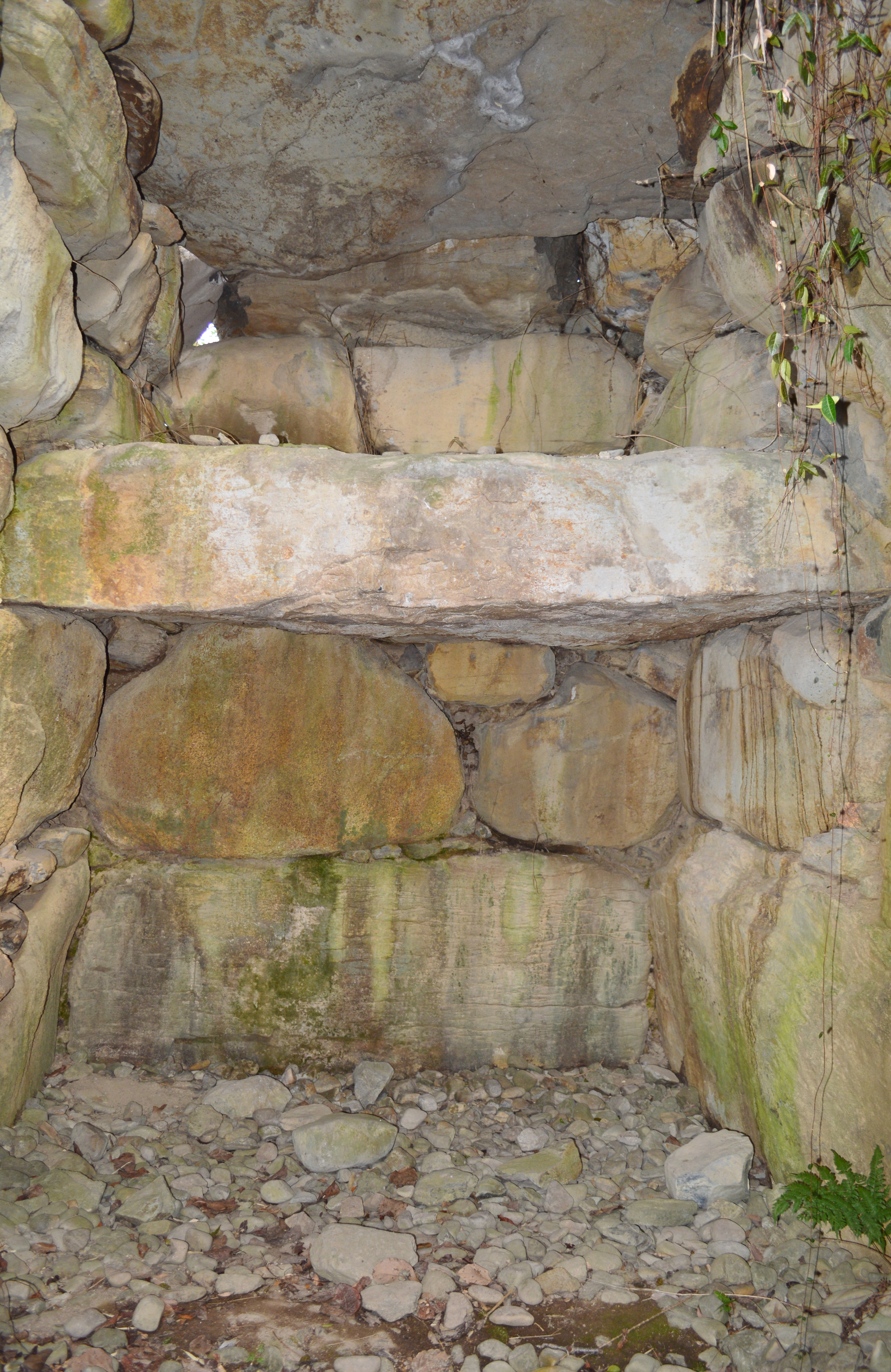 久本古墳 石室玄室